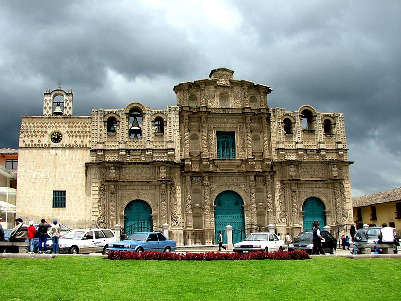 Catedral de Cajamarca (Perù)